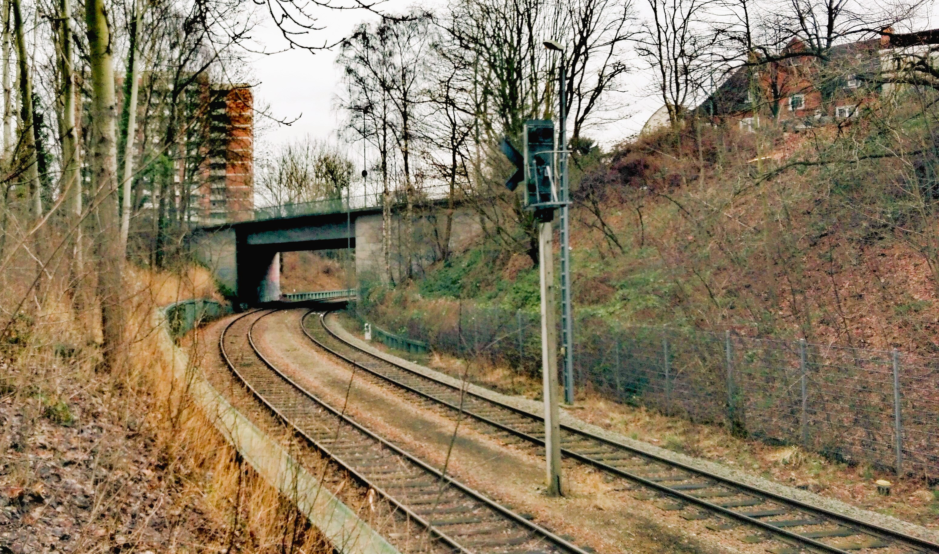 Die einstige Beton-Fußgängerbrücke von der Arbeitersiedlung in der Luisenstraße